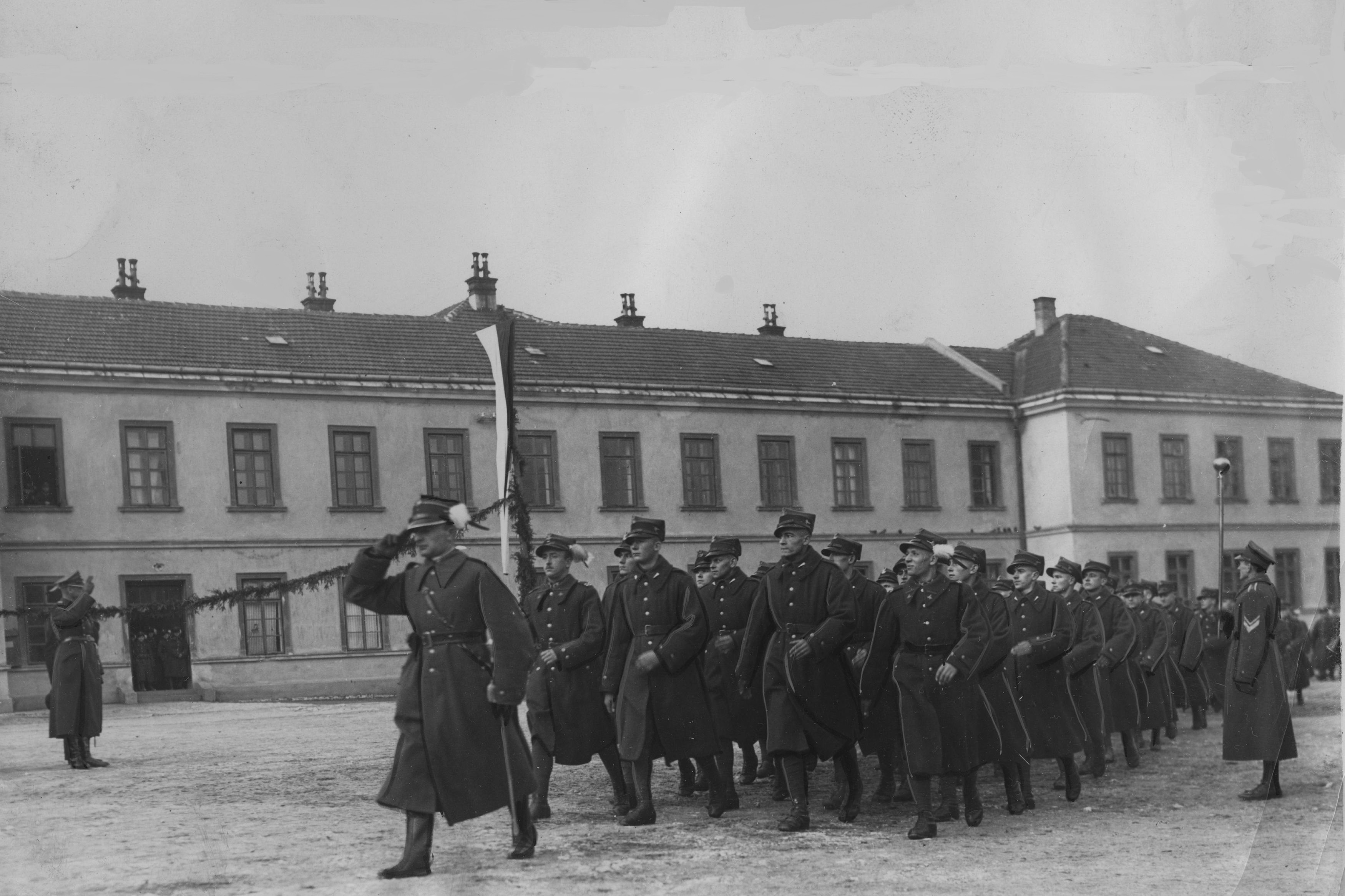 Zaciąg ochotniczy do 3 Pułku Strzelców Podhalańskich w Woli Justowskiej - oddział rekrutów defiluje na dziedzińcu koszar. Koncern Ilustrowany Kurier Codzienny - Archiwum Ilustracji. Sygnatura: 1-W-1316-2